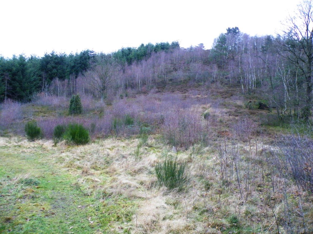 Hang des Gräfenberg im Naturschutzgebiet Wacholdervorkommen Gräfenberg im Dezember 2014 vor Pflegearbeiten (Gehölzentfernung mit Freischneider und Motorsäge).